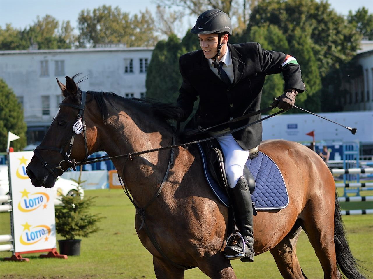 Demeter Bence öttusázó